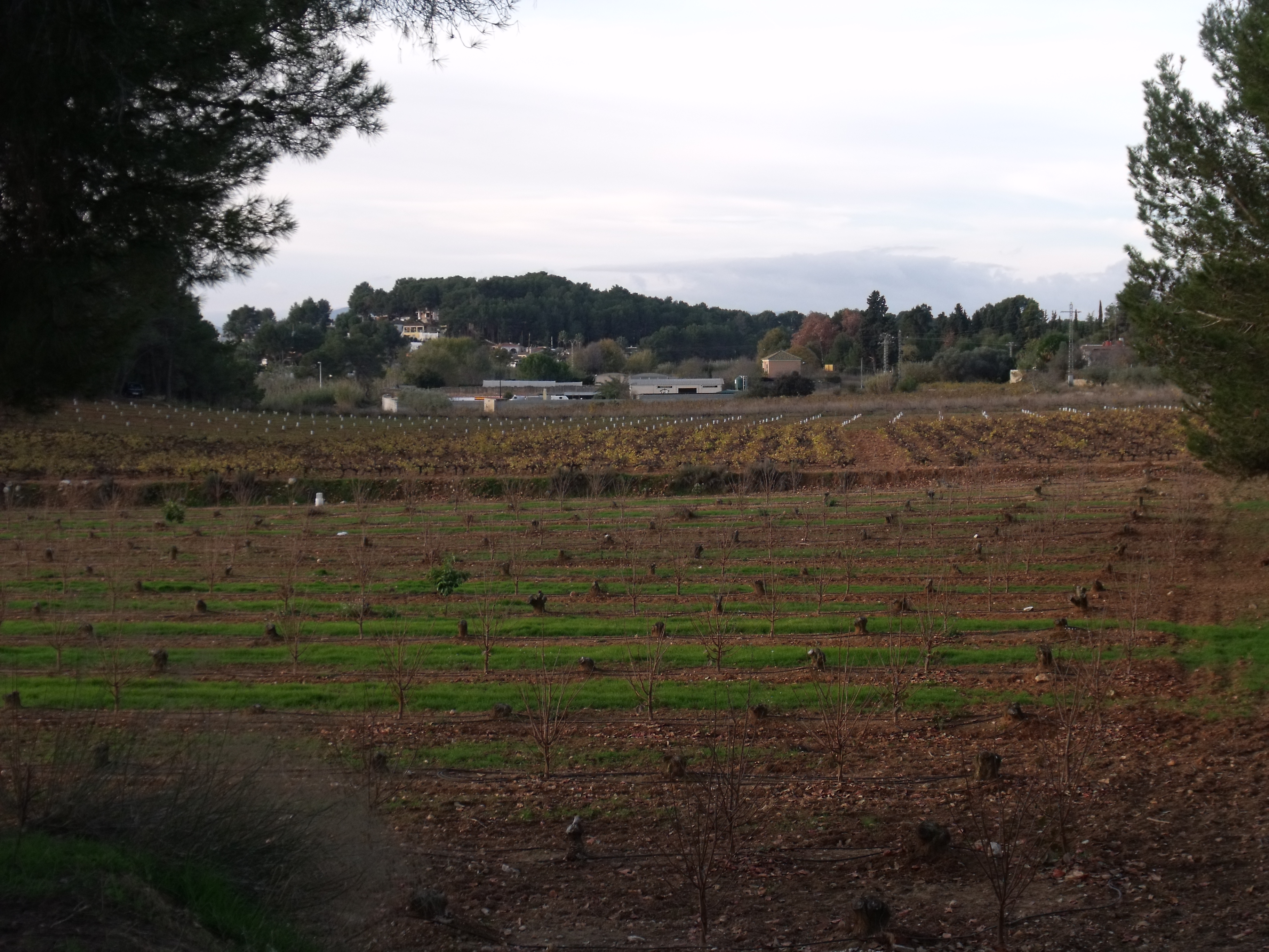 Huertos de frutales en la parte más oriental del término municipal de Godelleta.